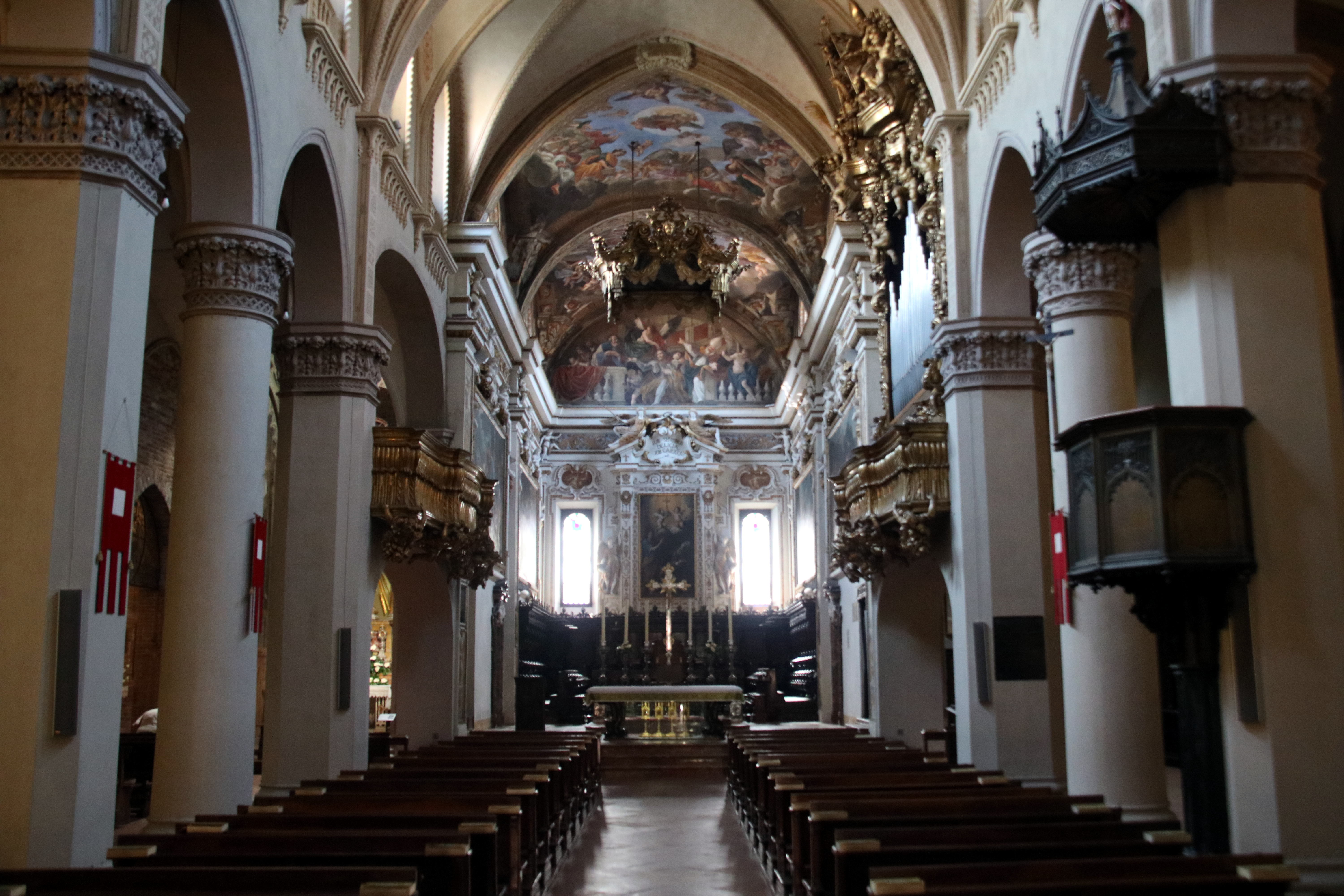 basilica di Sant'Antonino This is a photo of a monument which is part of cultural heritage of Italy.